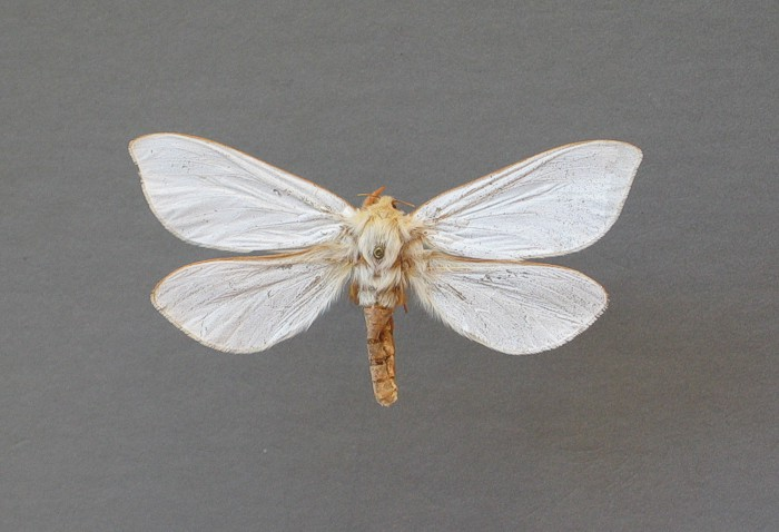 Hepialus humuli